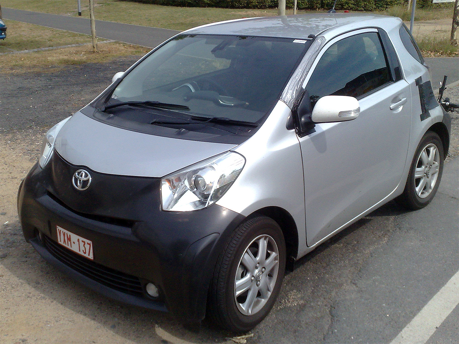 Toyota iQ Testwagen mit neuem Diesel-Motor, Sensor an der Frontscheibe und anderen Außenspiegeln.